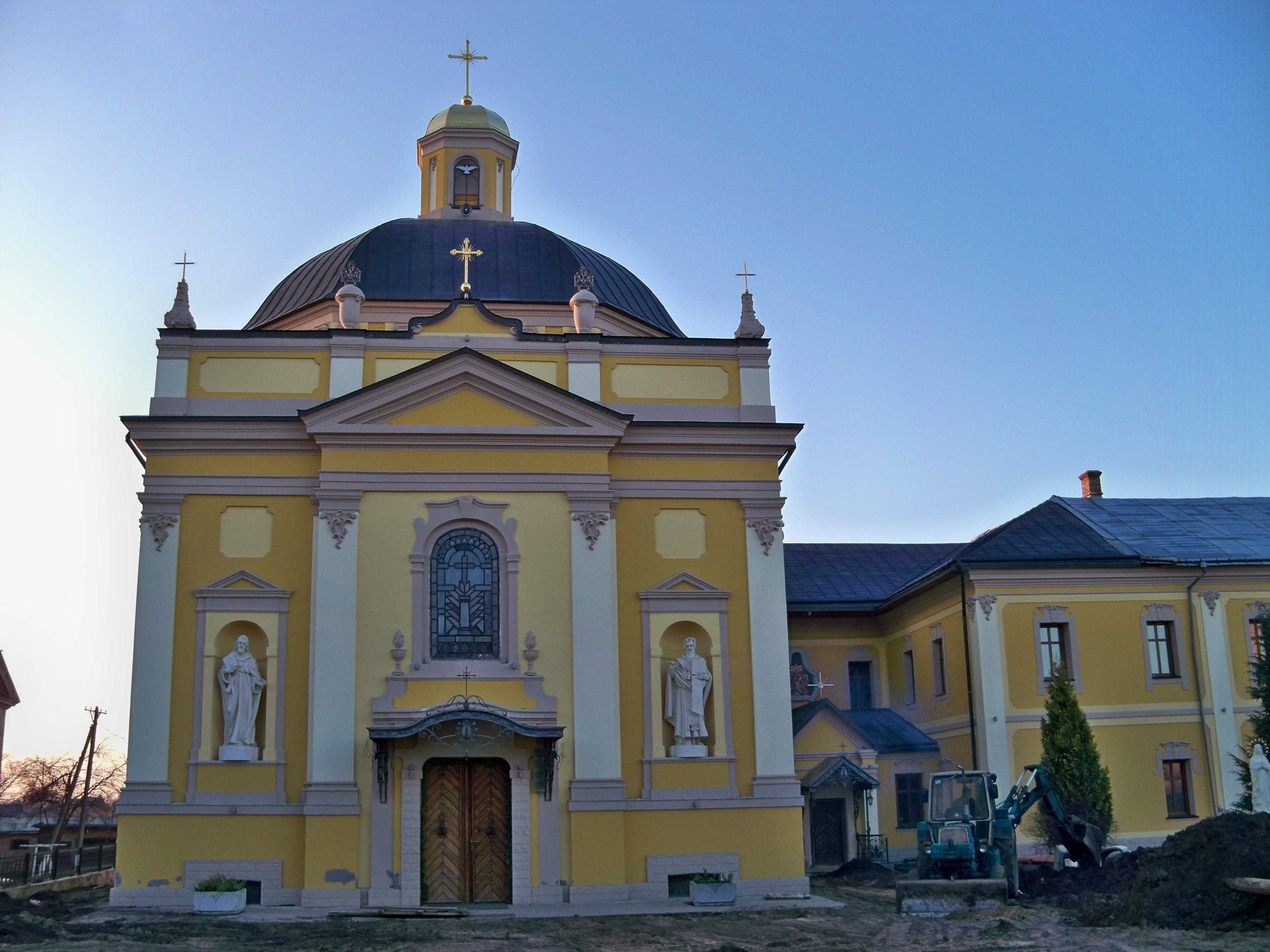 Церква Св.Юрія (мур.), Червоноград, вул.Б.Хмельницького, 21